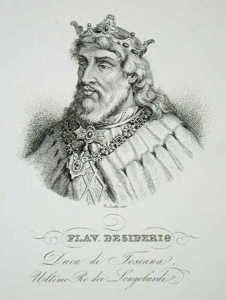 Ritratto a mezzobusto di Flav. Desiderio